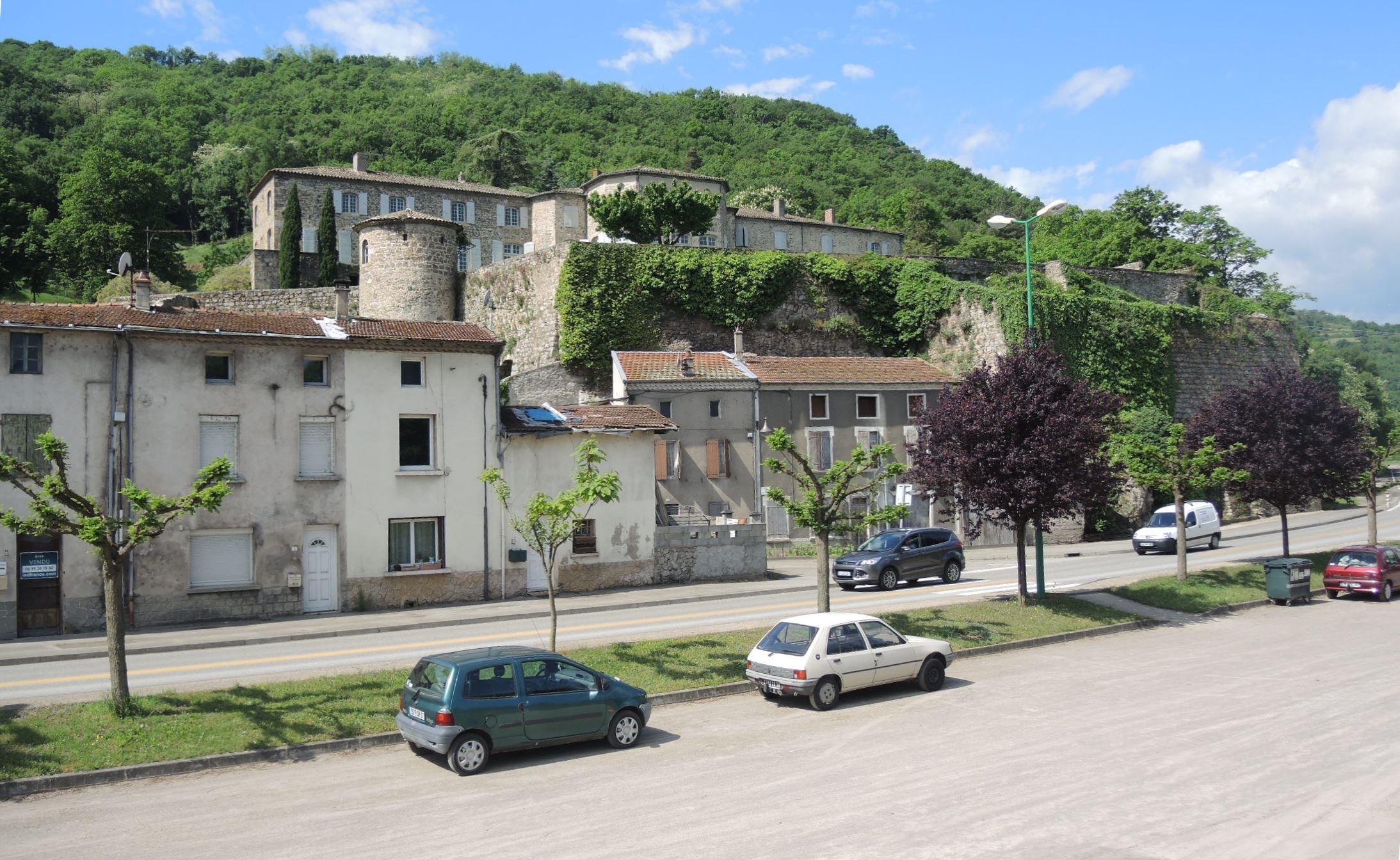 Peyraud détail